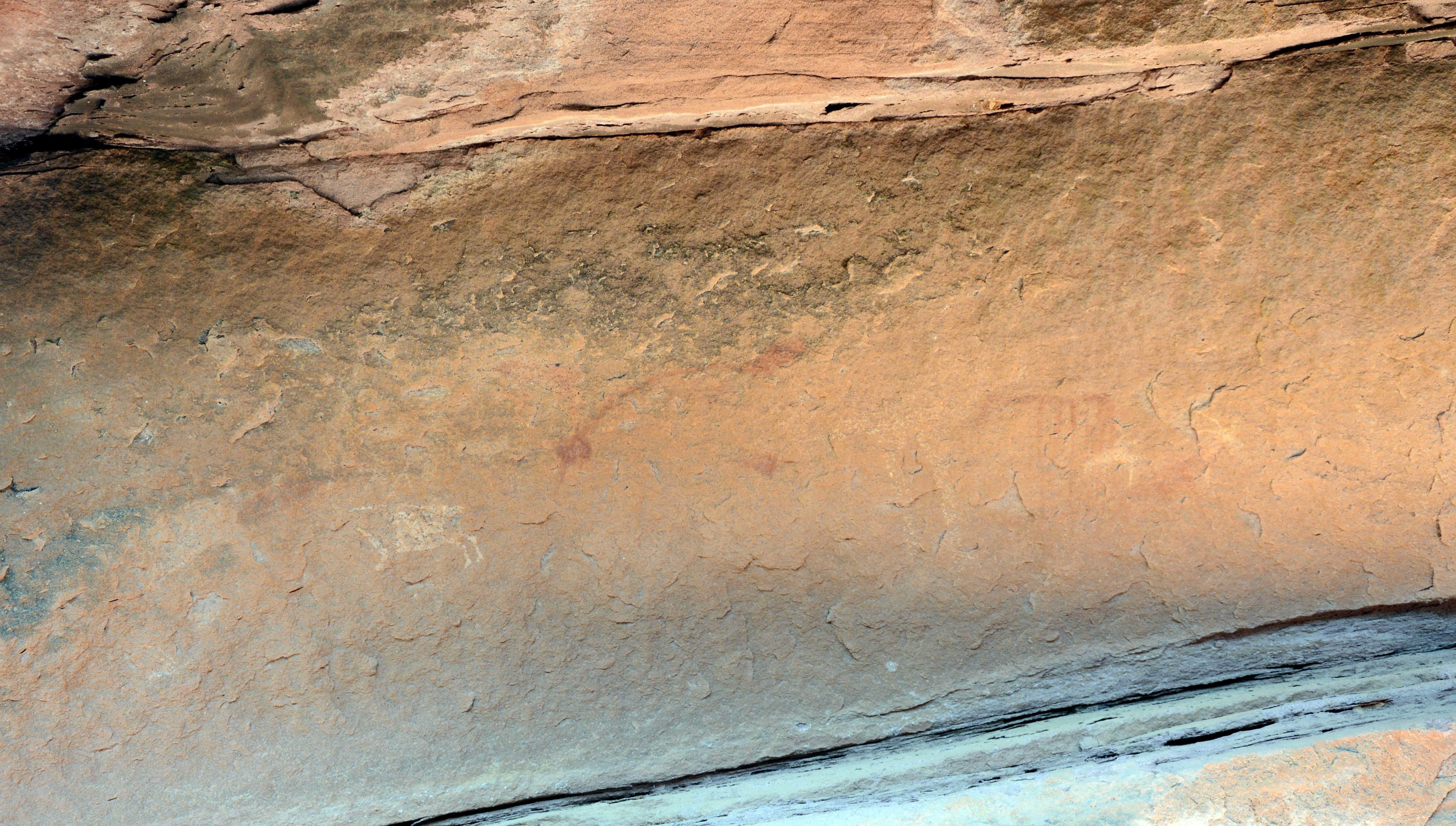 Panel decorado en el Abrigo del Barranco de la Casa de Forestal de Tormón II, Rodeno de Tormón, Parque Cultural de Albarracín (2018).